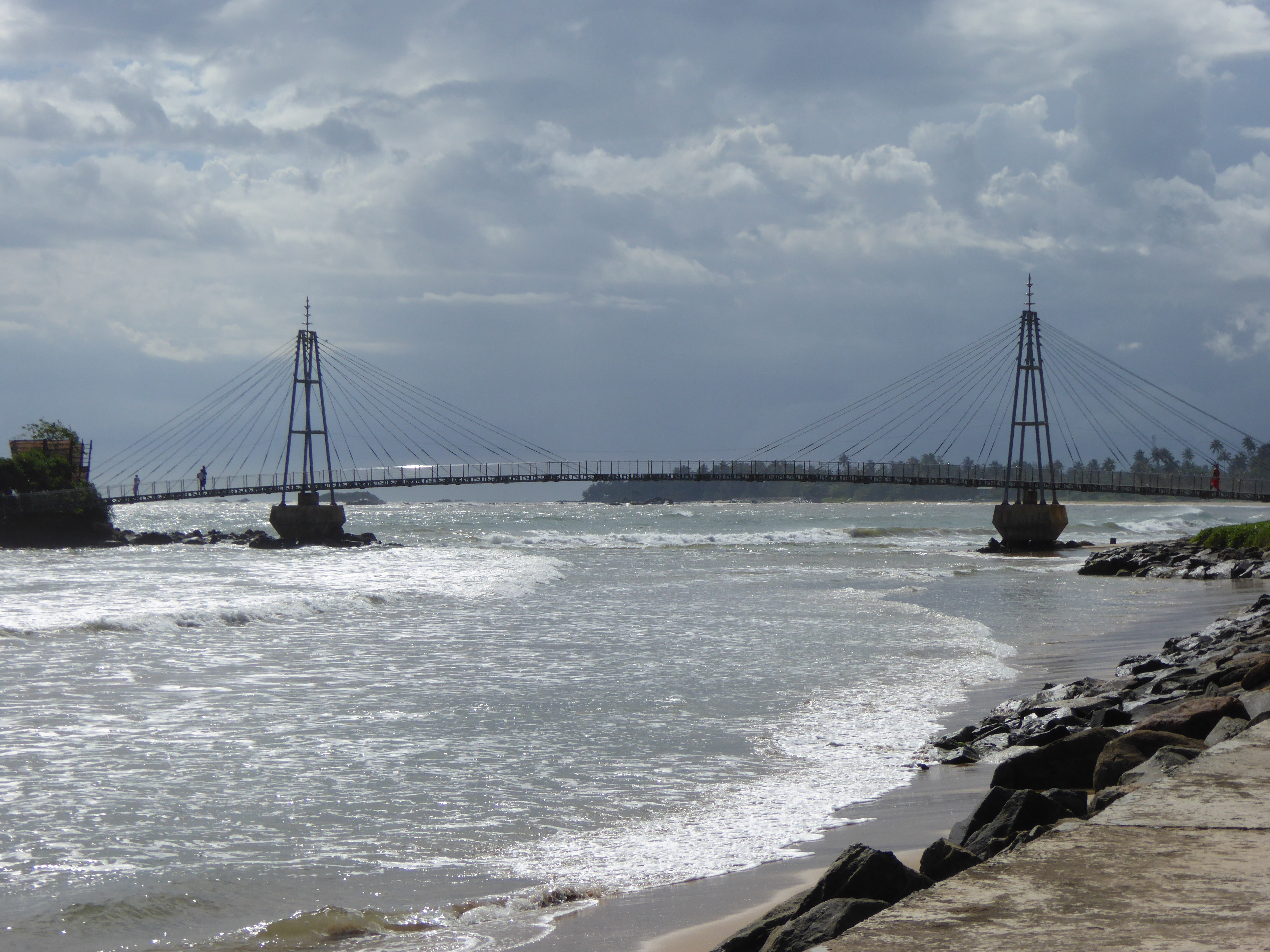 Paysage sri lankais. Photo taken during a trip to Sri Lanka in 2014.